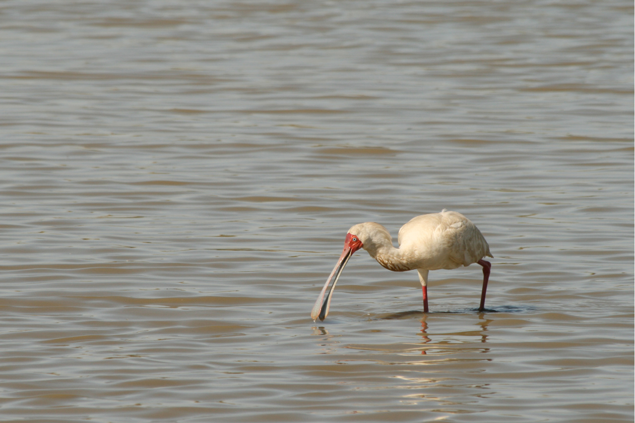 Spatule d'Afrique dans la reserve de Djoudj